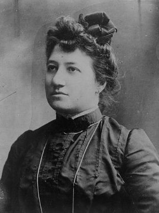 Adelina Saulino (Joe Petrosino's Wife)